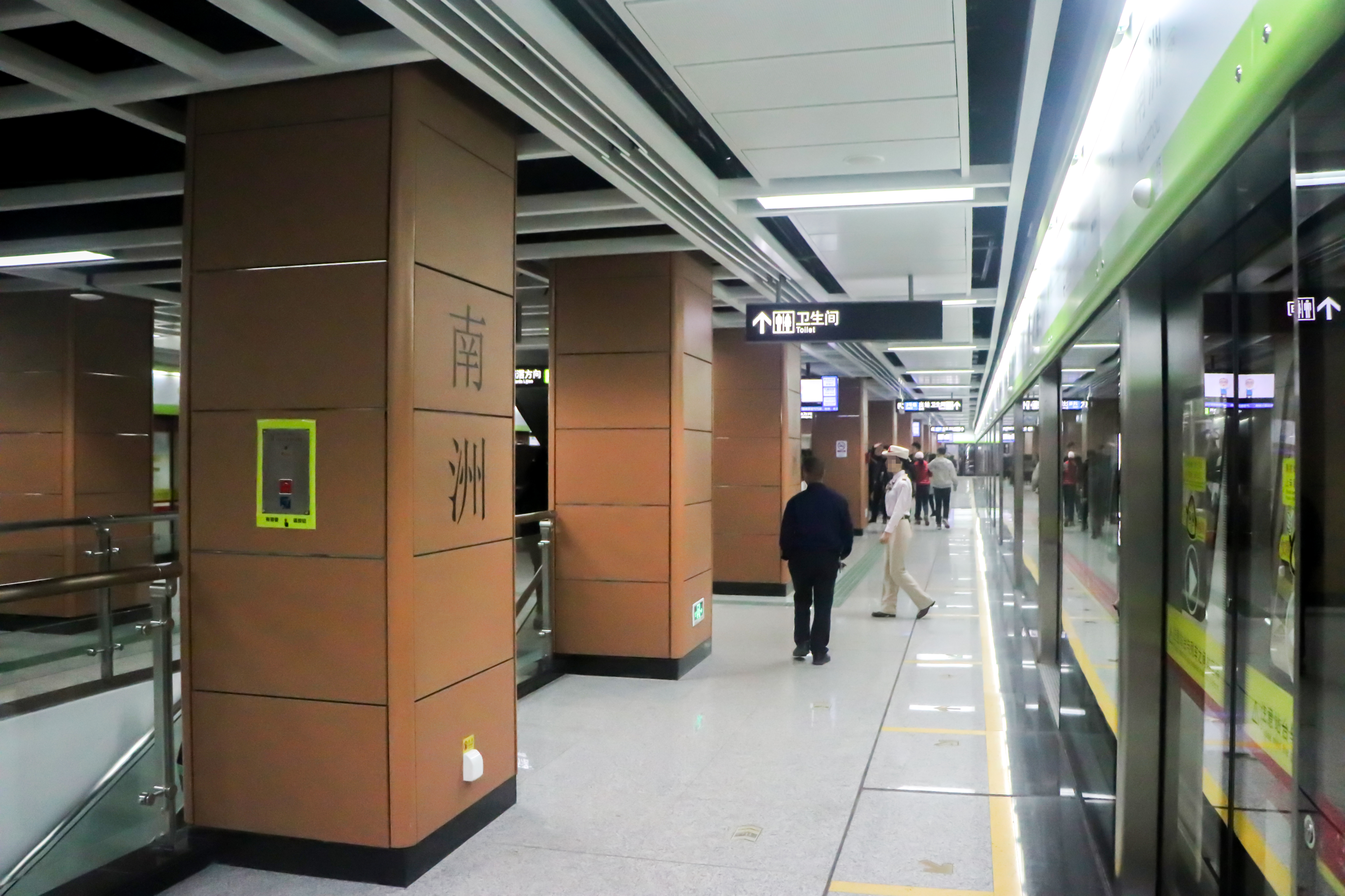 广州地铁南洲站